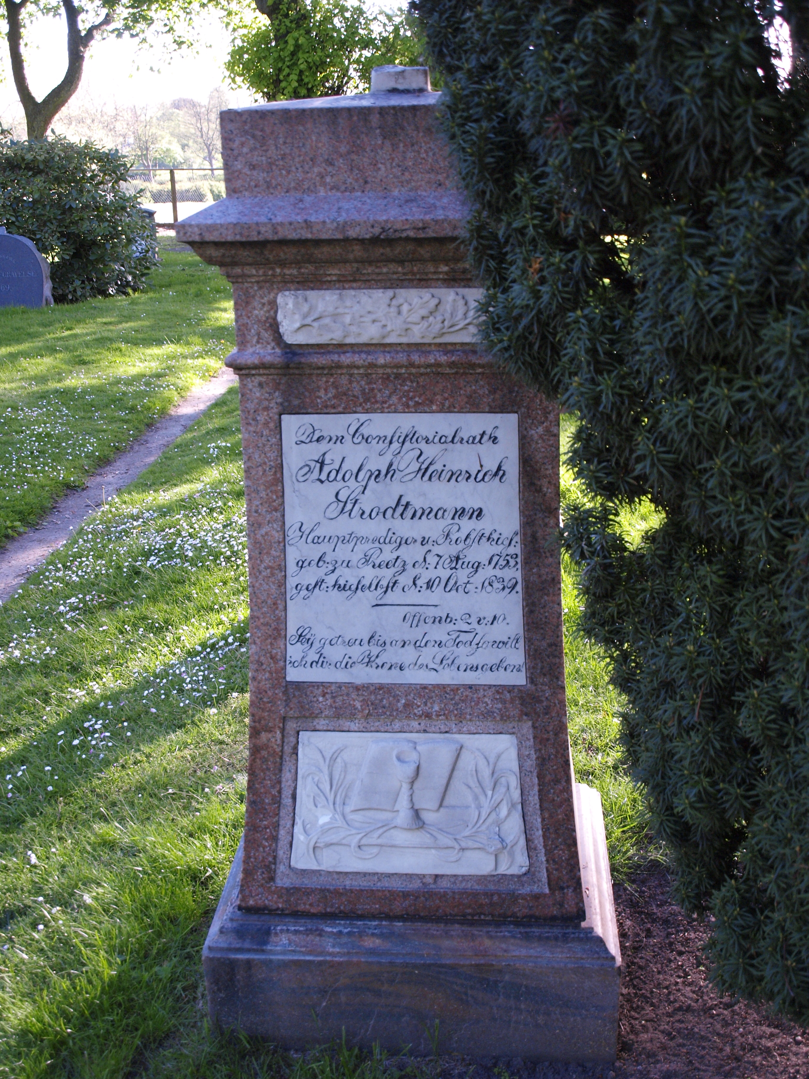 Adolph Hinrich Strodtmann 1753-1839 - Billedet stammer fra Haderslevs gamle kirkegård hvor det er taget 22. maj 2015